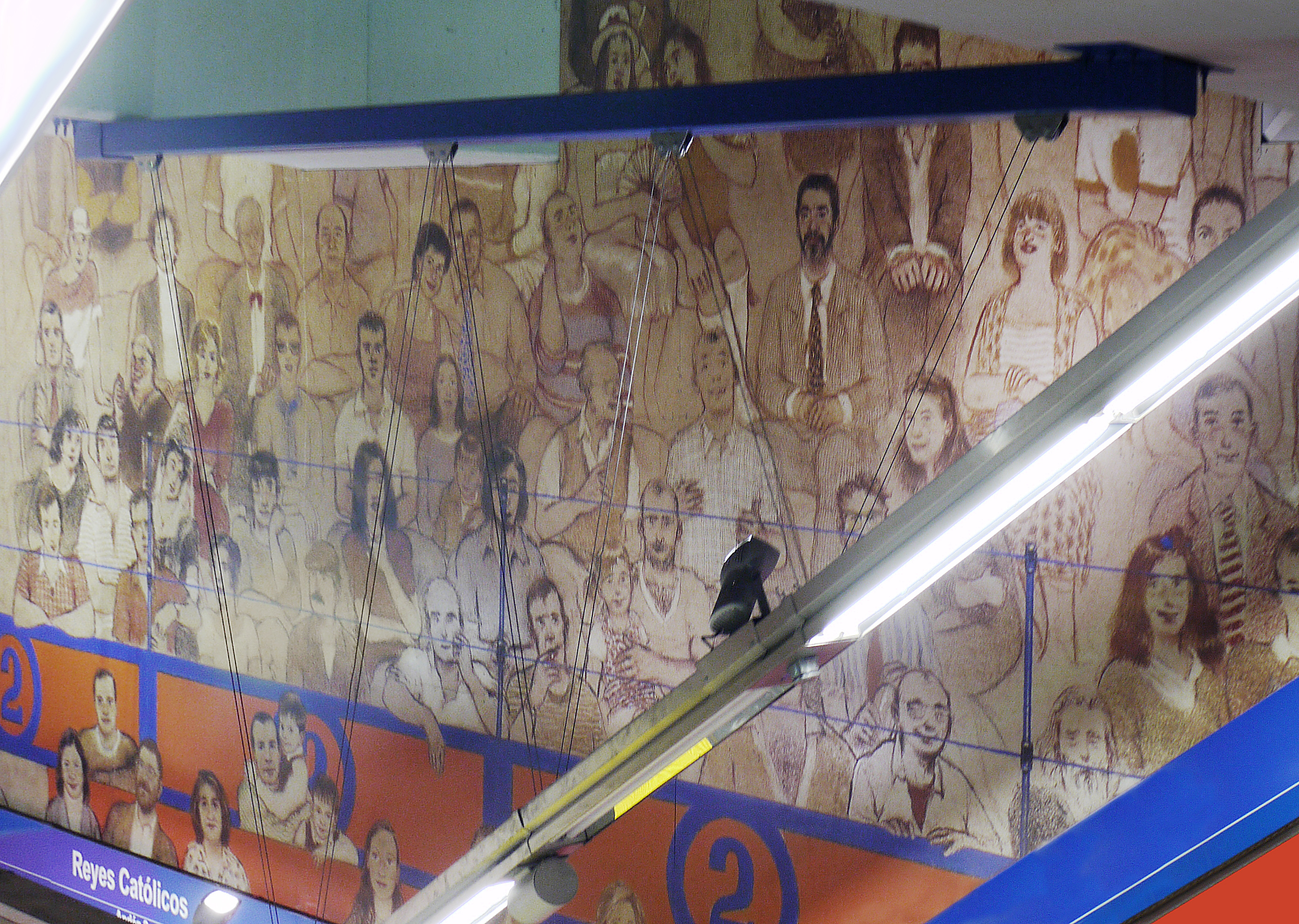 Estación de Metro de Reyes Católicos, San Sebastián de los Reyes, Comunidad de Madrid, España. Mural.